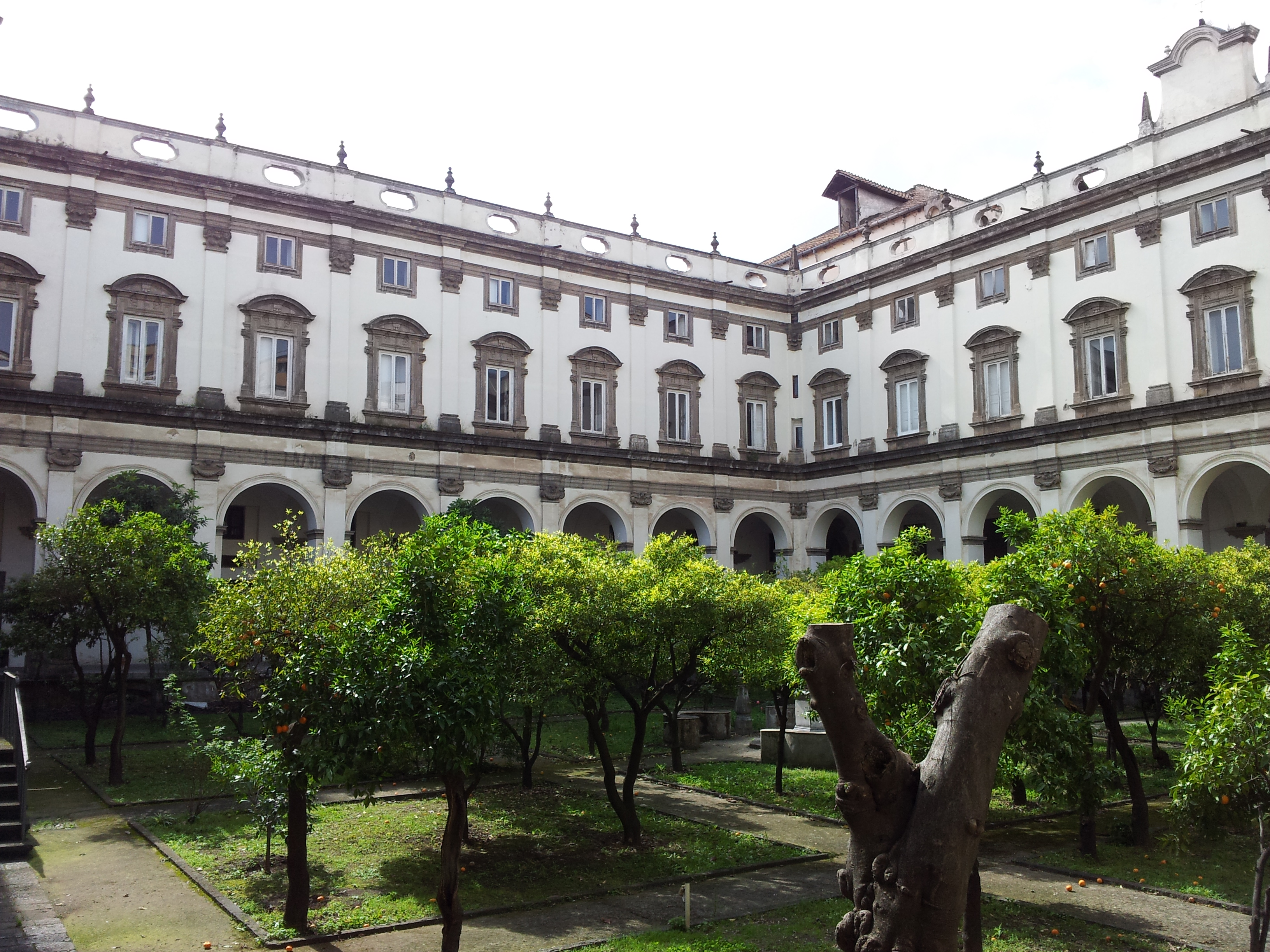 Chiostro degli Aranci (Chiostro grande dei Girolamini, Napoli)